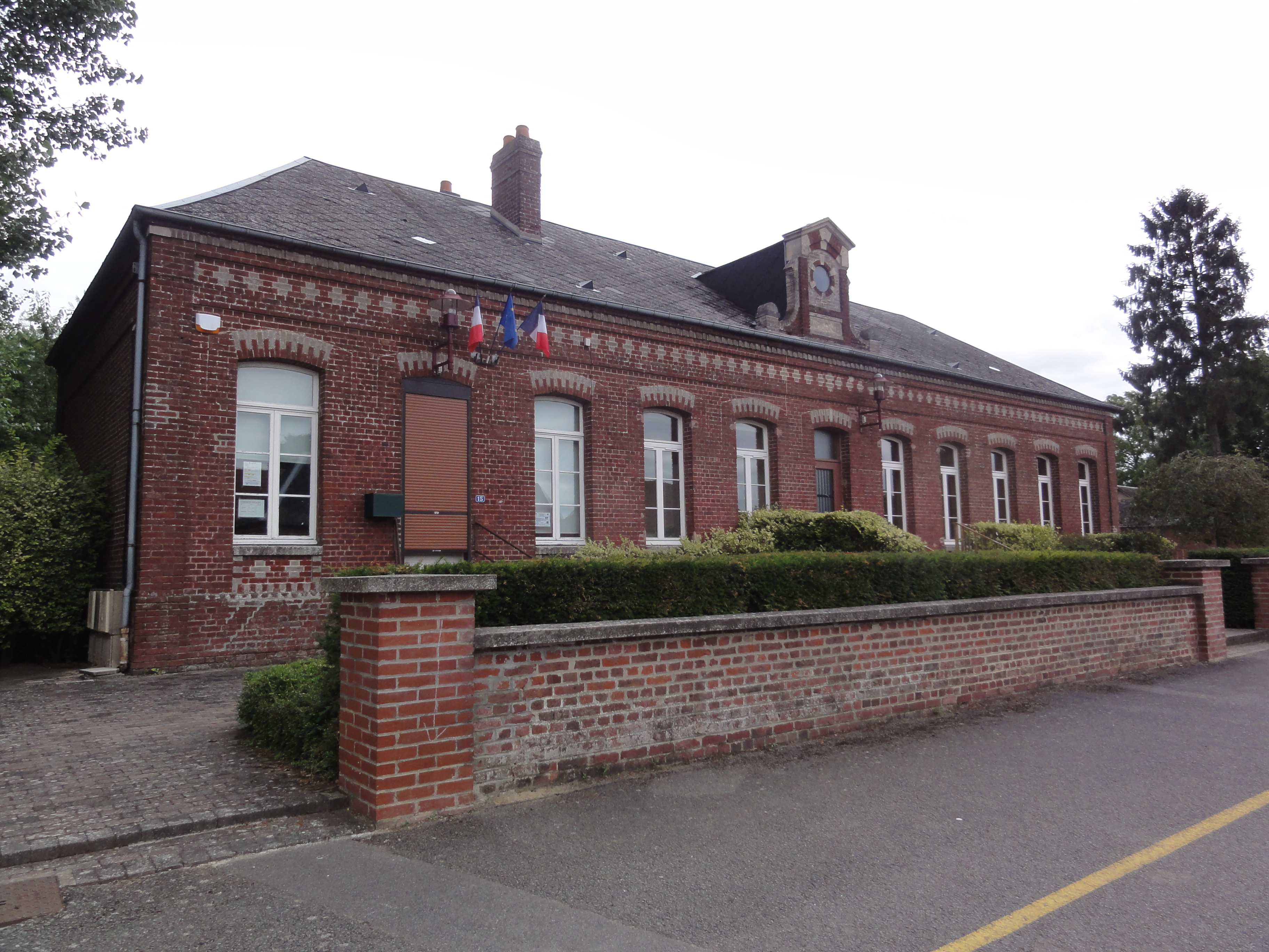 Beaumont-en-Beine (Aisne) mairie-écoles